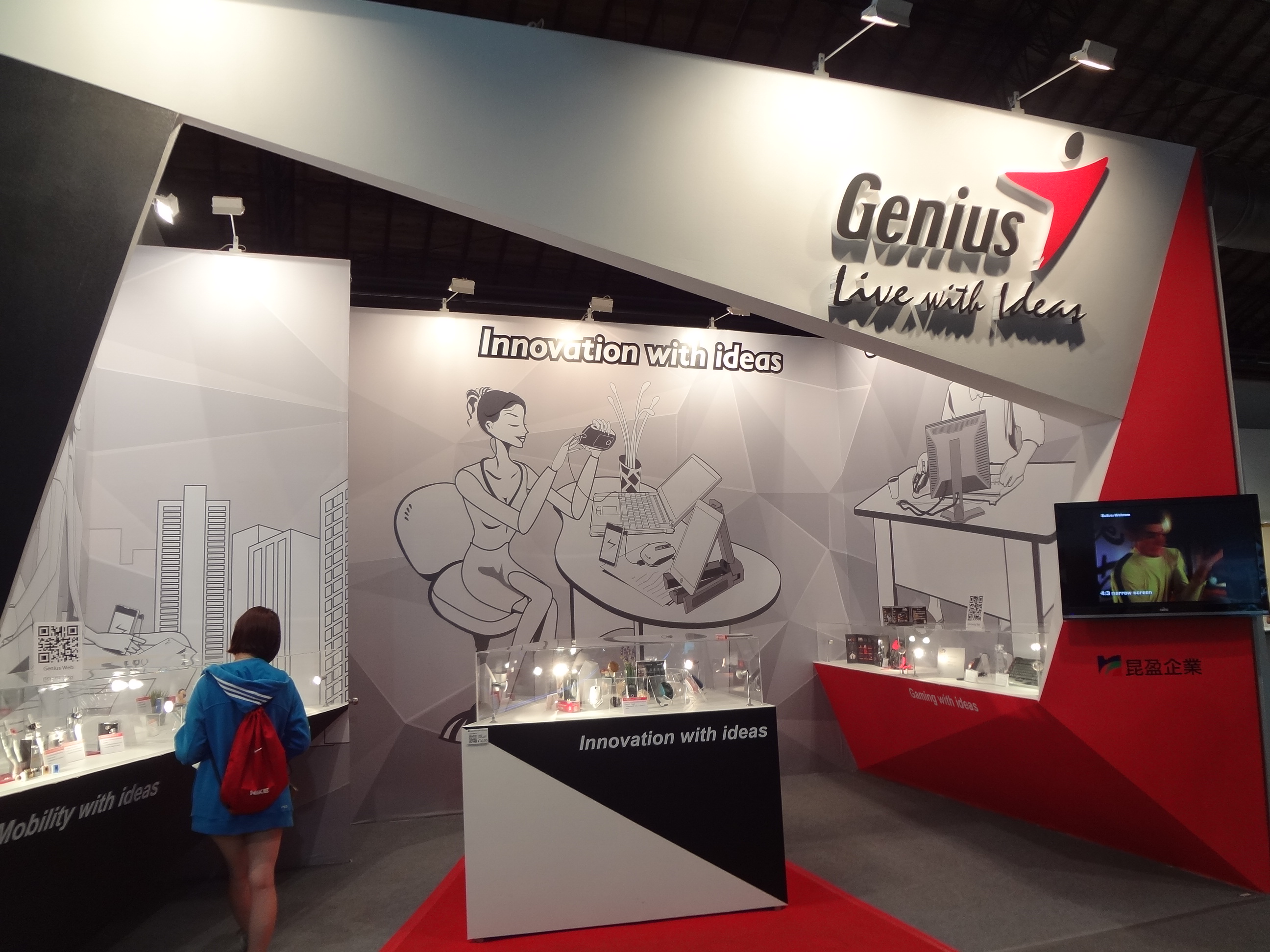 昆盈企業在2013台灣設計展的攤位